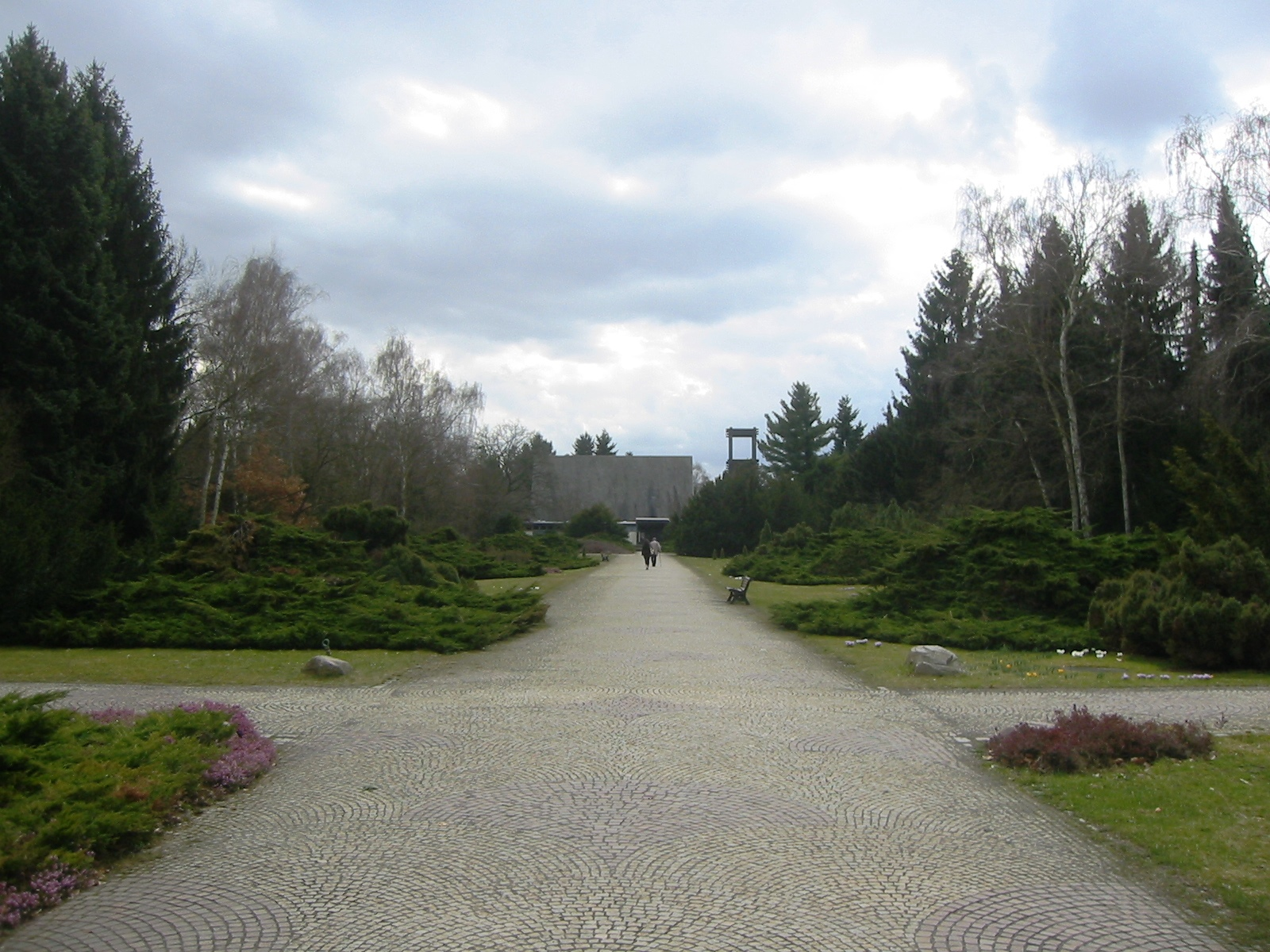 Zentrale Sichtachse auf dem Berliner Heidefriedhof im Bezirk Tempelhof-Schöneberg; Blick vom Eingang auf die Trauerhalle